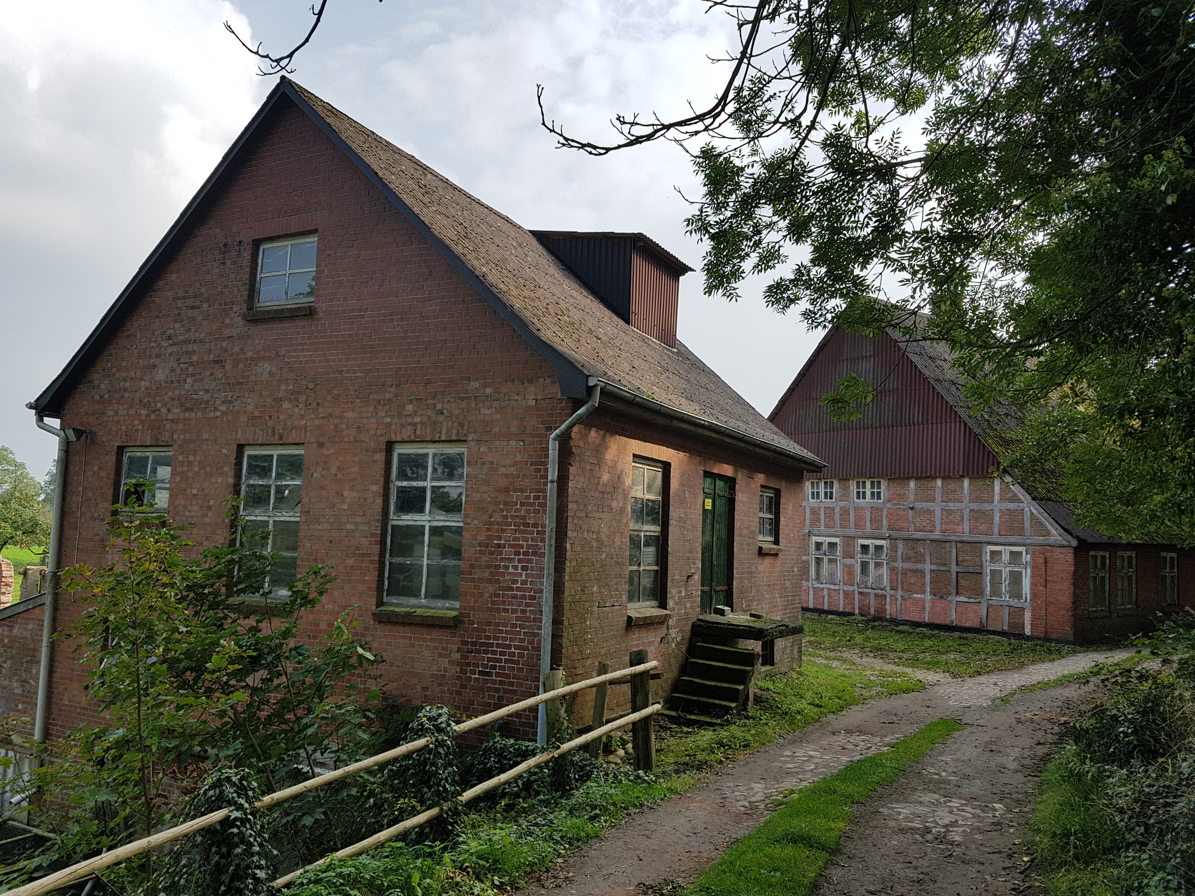 fröhere Watermöhl Lüttmöhlen